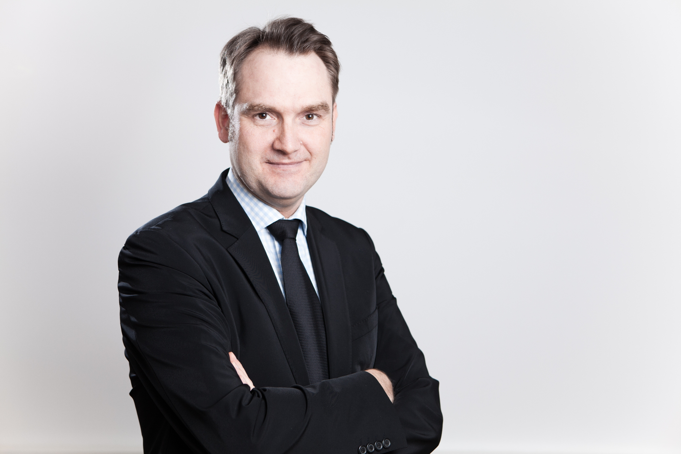 Oliver Grün